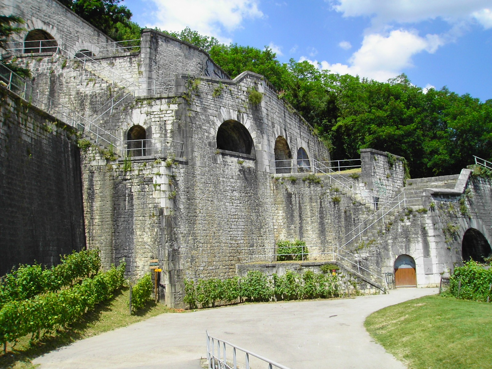 Fortifications de la Bastille vers la place Saint Laurent - Grenoble